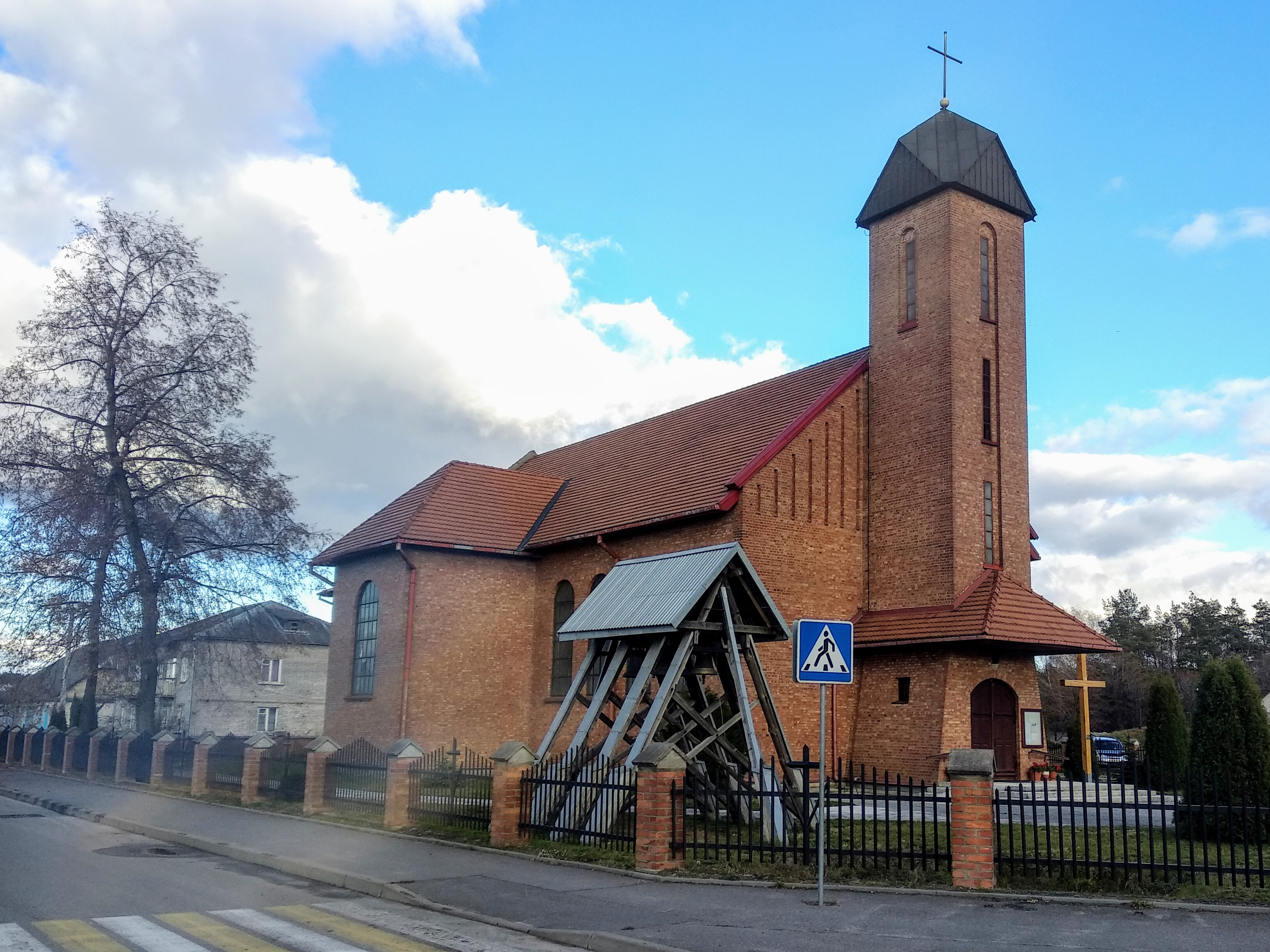 Church in Biarozauka, Belarus